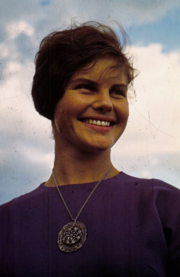 Berit Overgaard (farger)